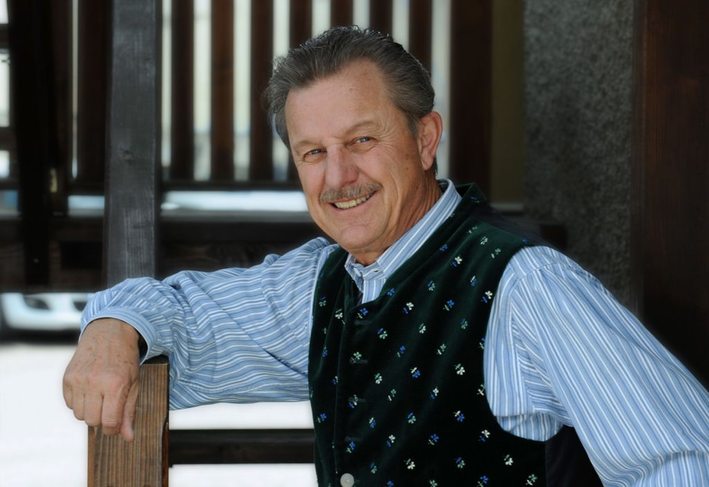 Portrait Werner Rom, fotografiert von Marco Orlando Pichler